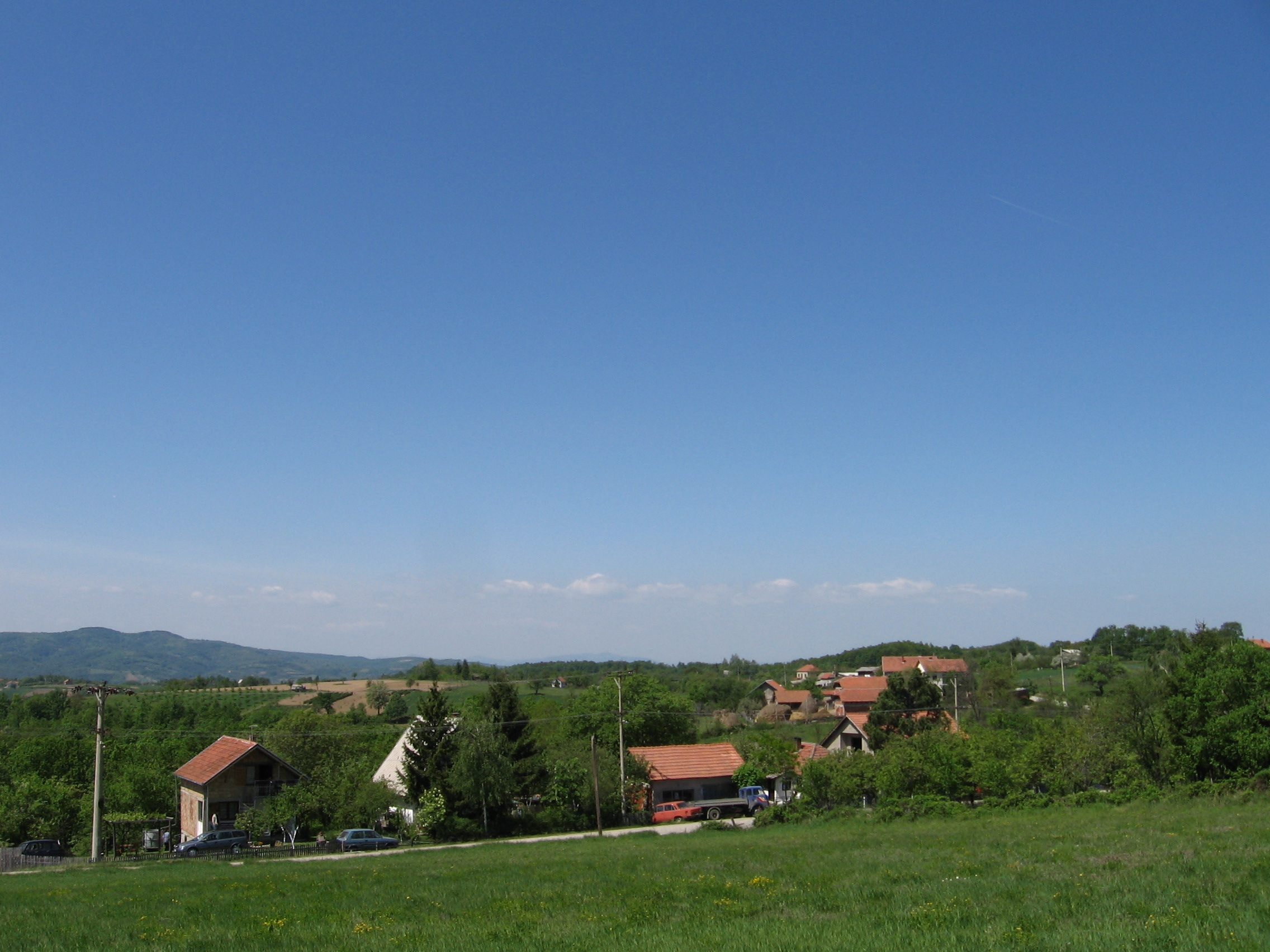 Центар села Велика Сугубина